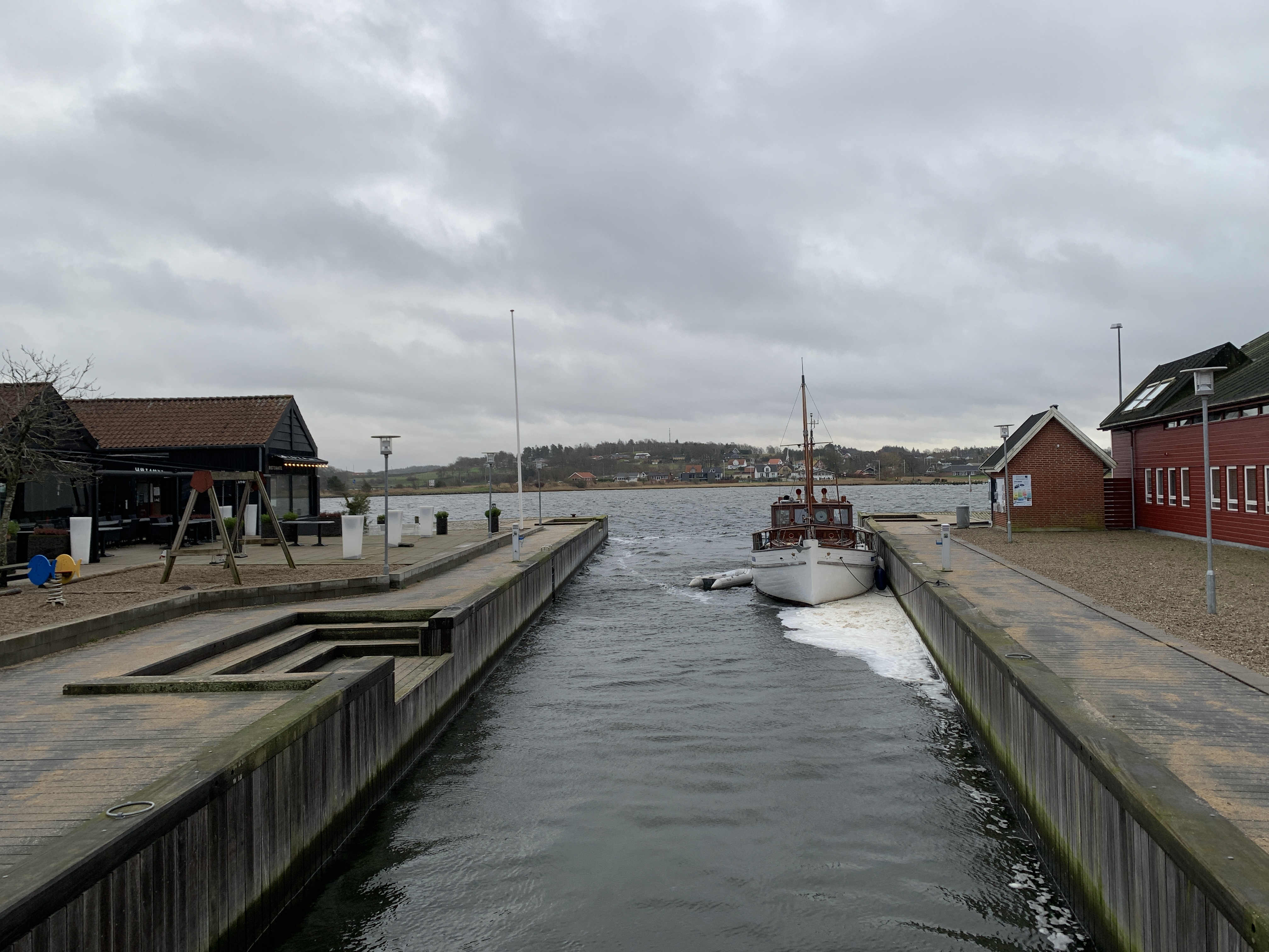 Havnekanalens udmunding i Mariager Fjord.